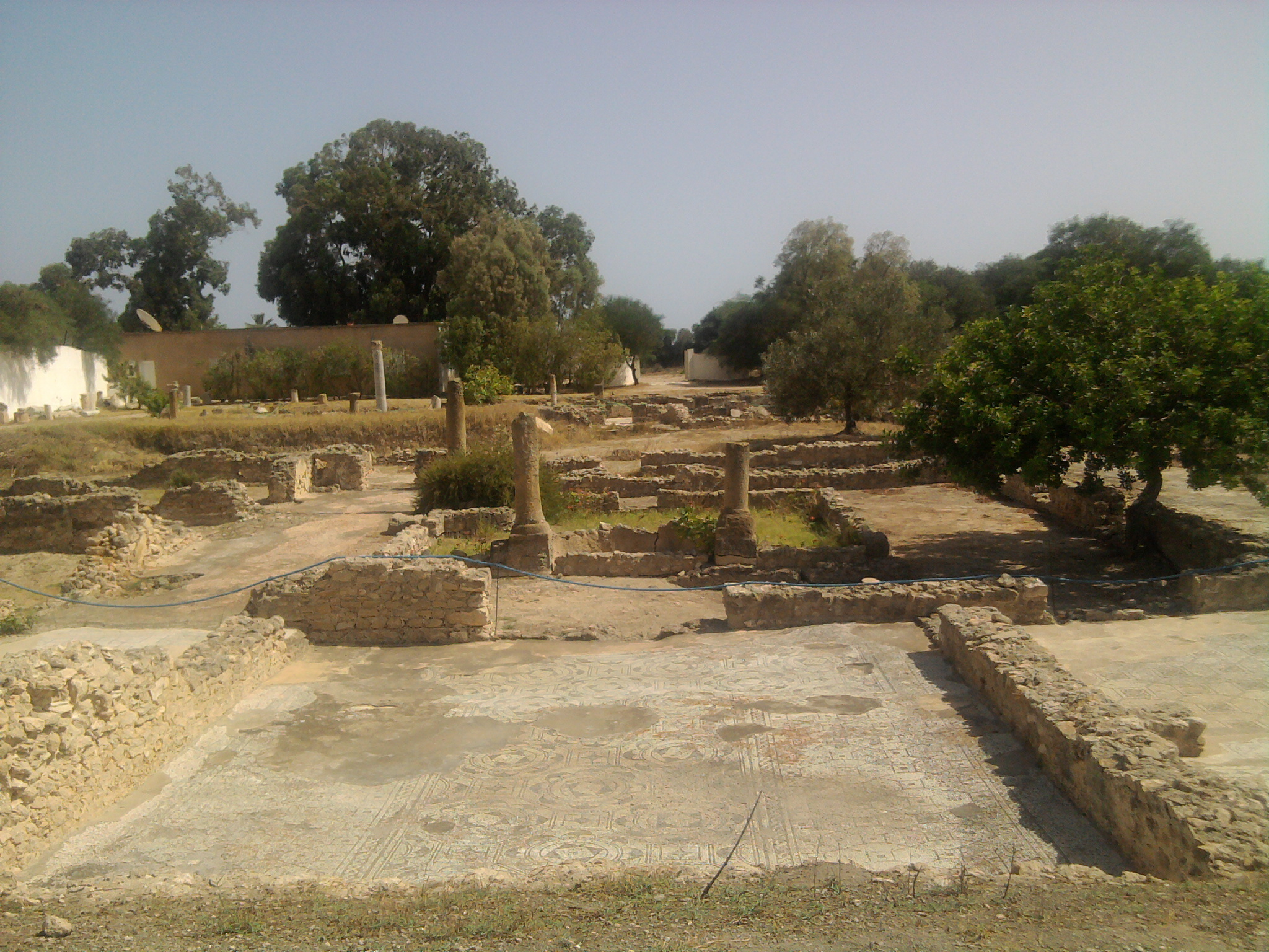 Tunisie, Site archéologique de Hammamet, Maison romaine à Pupput